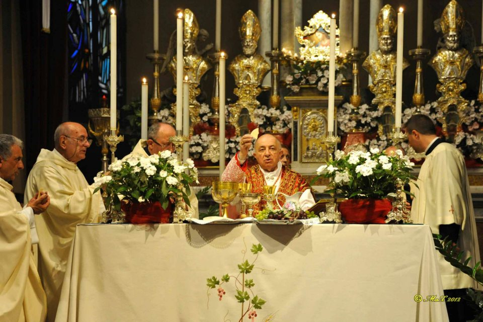 Il cardinale Dionigi Tettamanzi, arcivescovo emerito di Milano, durante una celebrazione presso la parrocchia di Vittuone (MI) nel maggio 2012. Alla sua destra il parroco don Antonio Ercoli, padre Secondo Brunelli C.R.S. e don Luigi Brigatti (parroco di Sedriano)